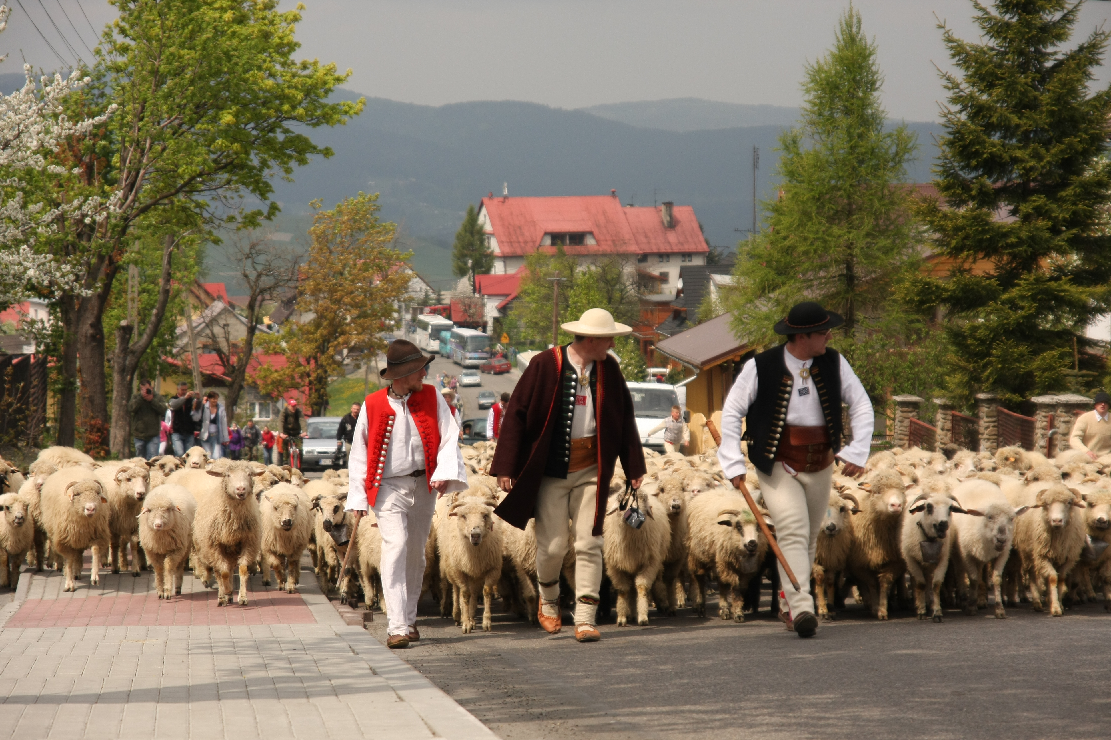 Corocznie w Koniakowie z początkiem maja odbywa się wiosenny redyk tzw. miyszanie owiec, podczas którego kilka mniejszych stad łączy się w jedno wielkie. Gazdowie oddają pod opiekę swoje stada bacy, który wraz z juhasami wyrusza na redyk na Ochodzitą. W tym dniu można zobaczyć odświętne regionalne stroje, usłyszeć głos trombity oraz zobaczyć pastereskie zwyczaje np. poświęcenie stada, okadzanie koszora i miyszani owiec wokół moja ustawionego na szczycie Ochodzitej.